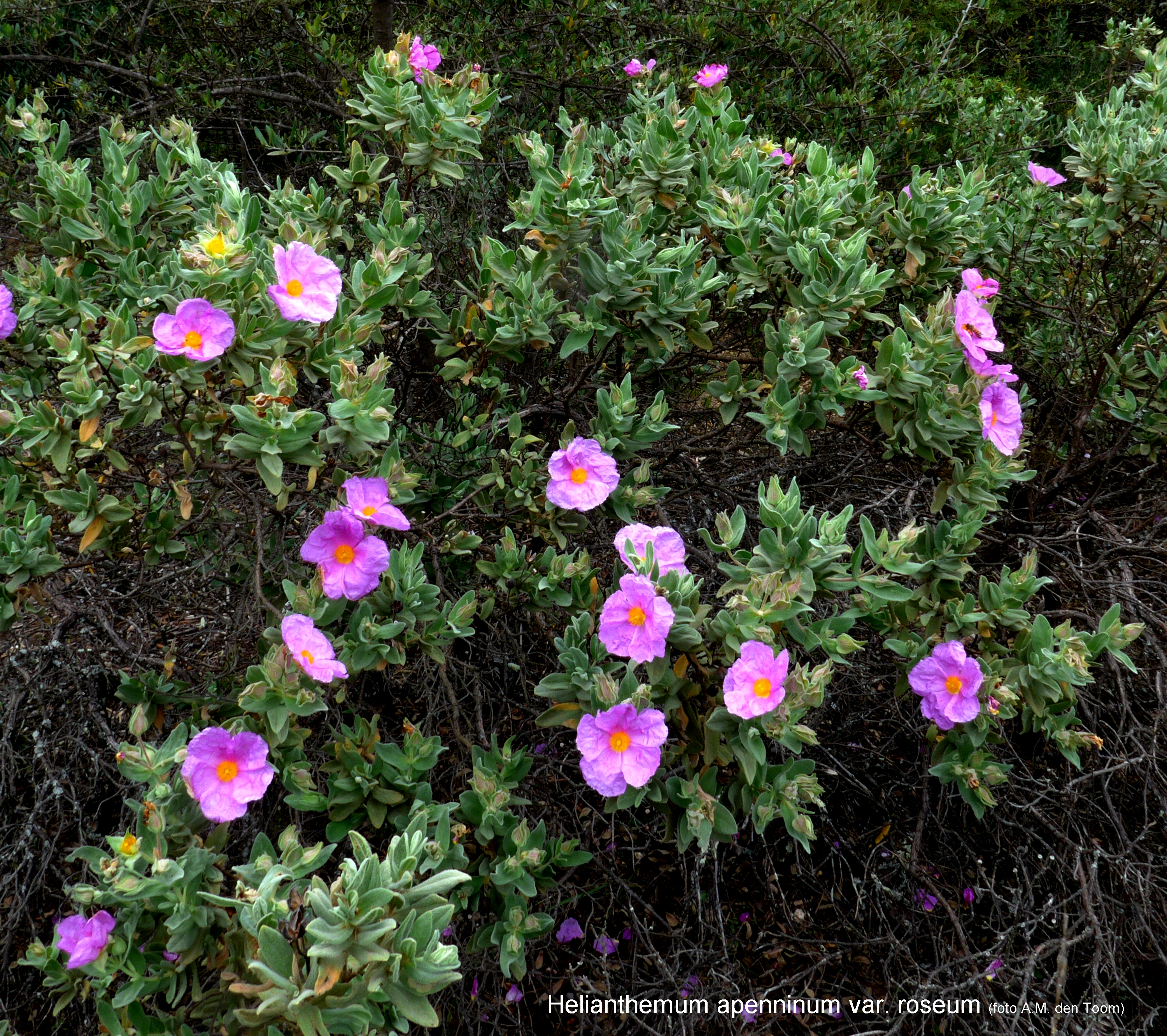 Helianthemum apenninum var roseum, rose variant van het zonneroosje, kalksteenplateau, Luberon, Zuid Frankrijk